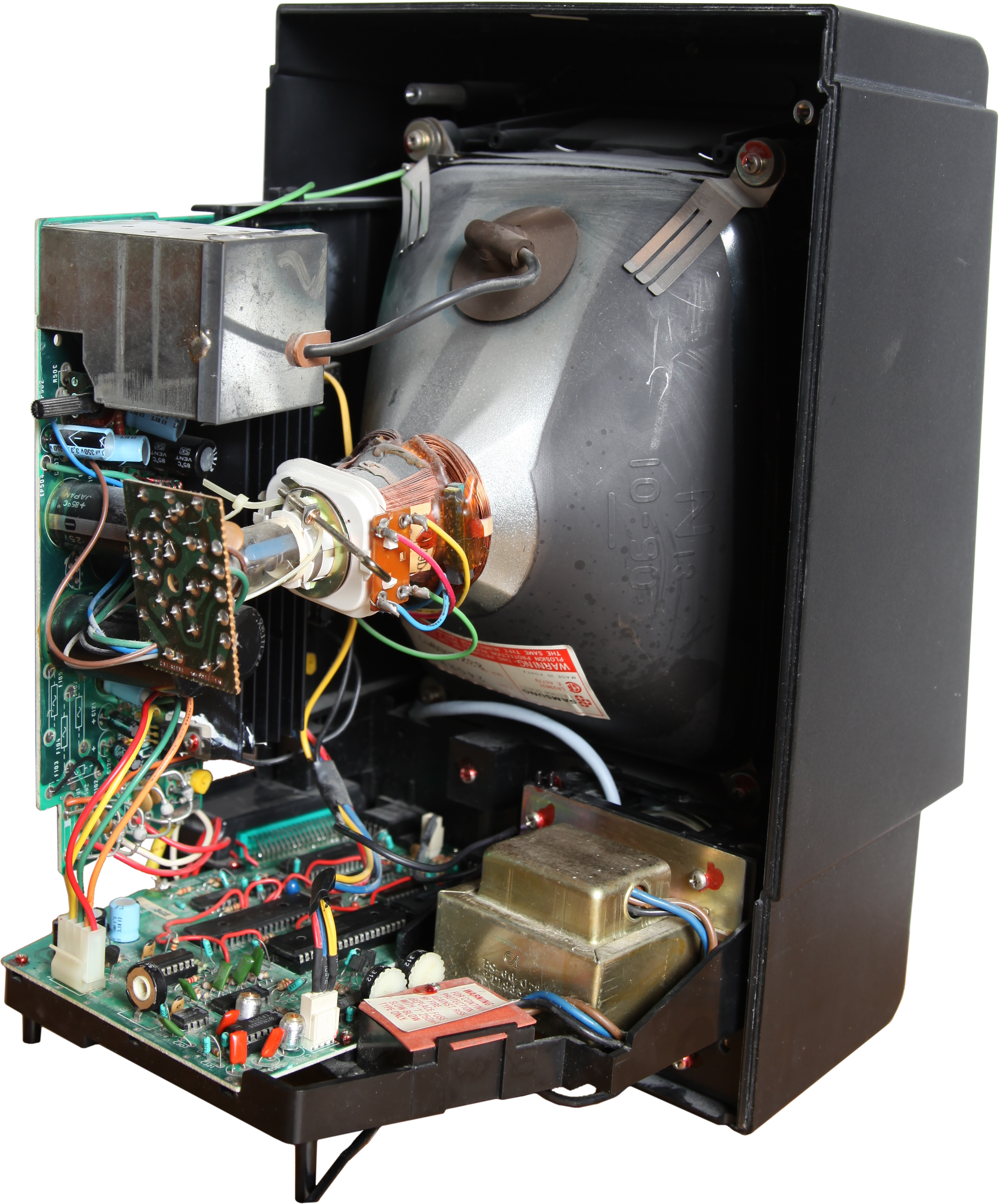 Vectrex back view open